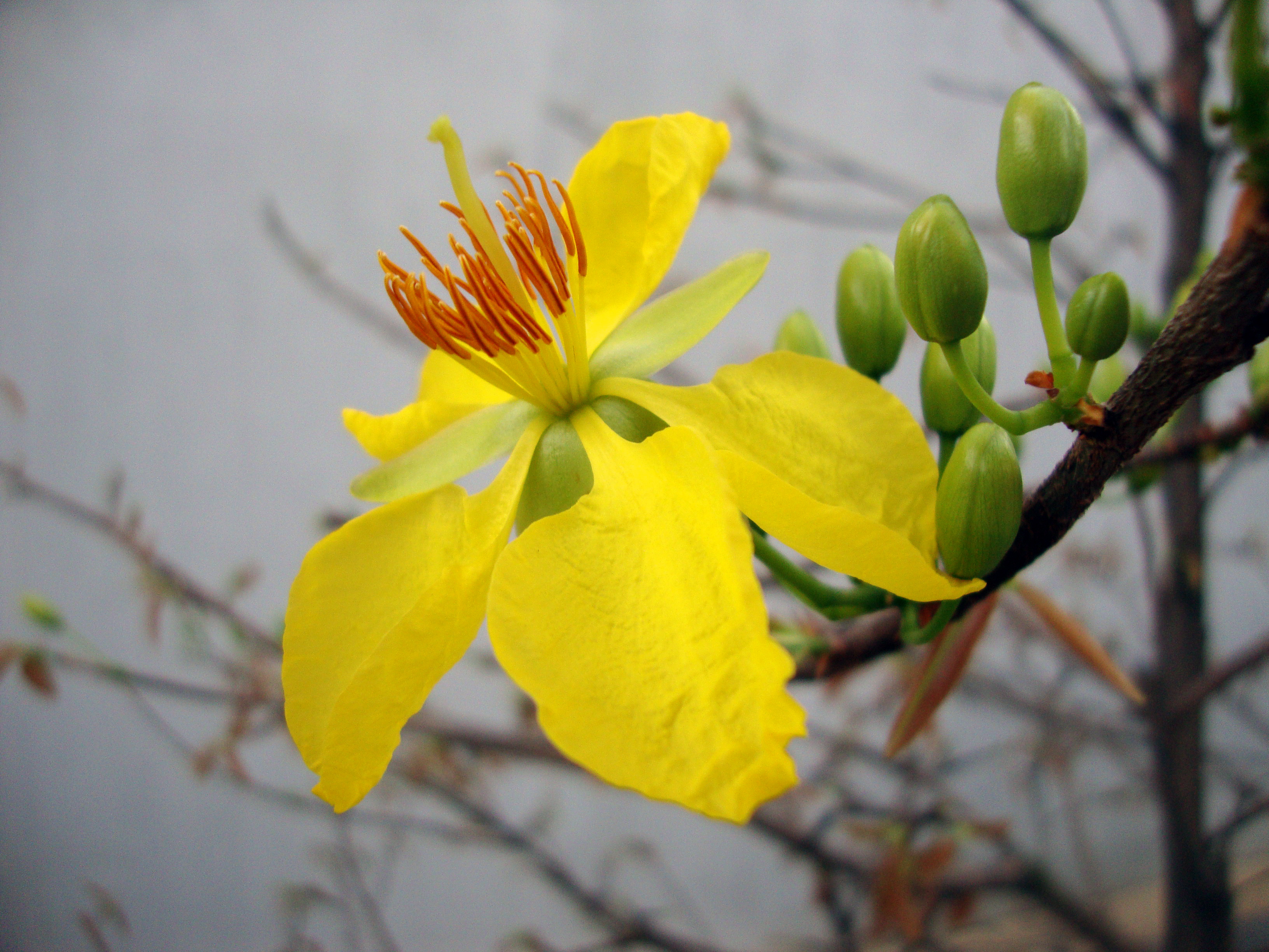 Ochna integerrima (Lour.) Merr., 1935